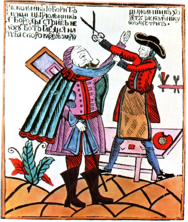 «Цирюльник хочет раскольнику бороду стричь. Раскольник говорит цирюльнику: „Слушай, Цырюльник! Я бороды стричь не хочу. Вот гляди, на тебя скоро караул закричу“.»